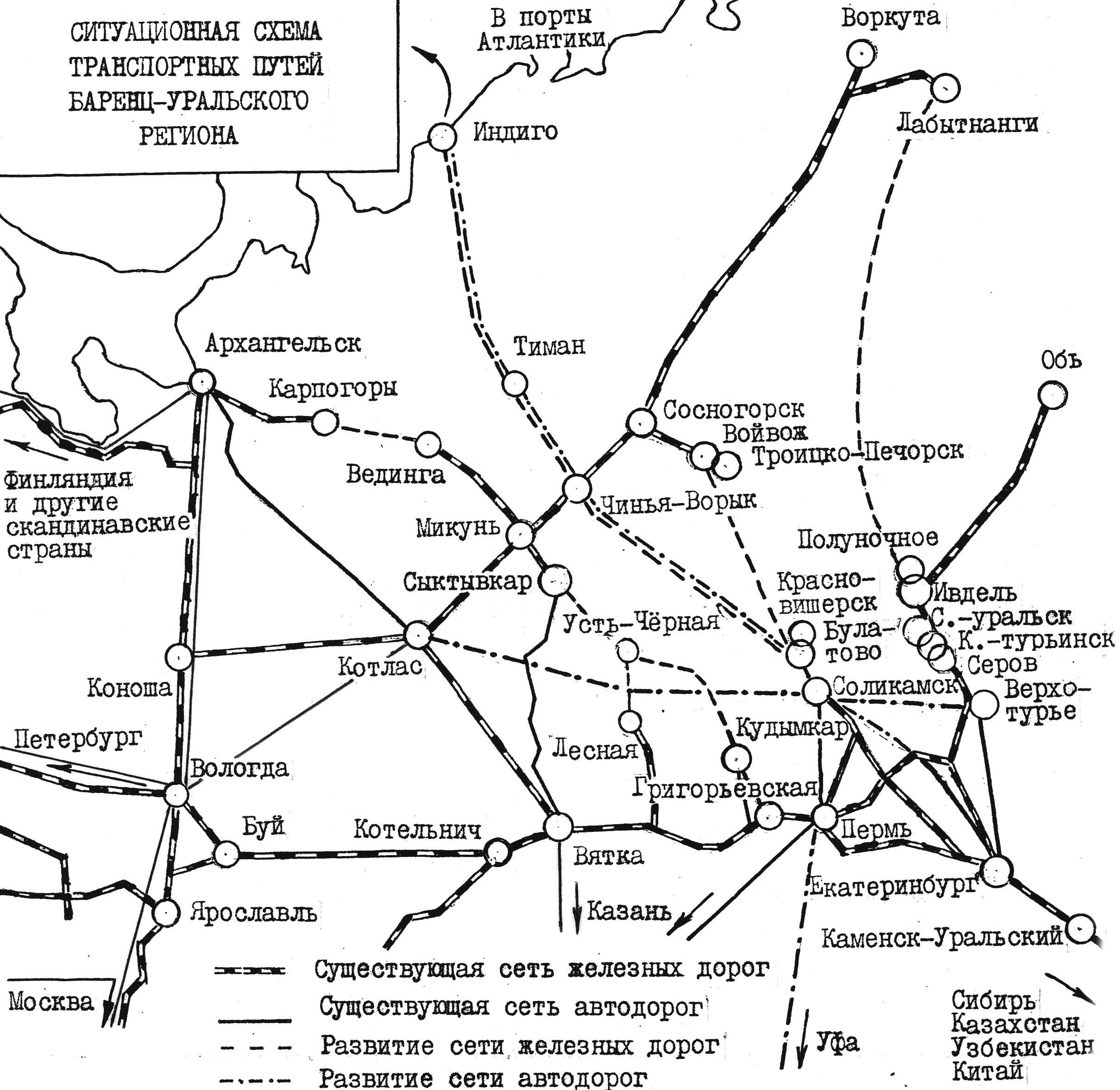 Ситуационная схема транспортных путей Баренц-Уральского региона